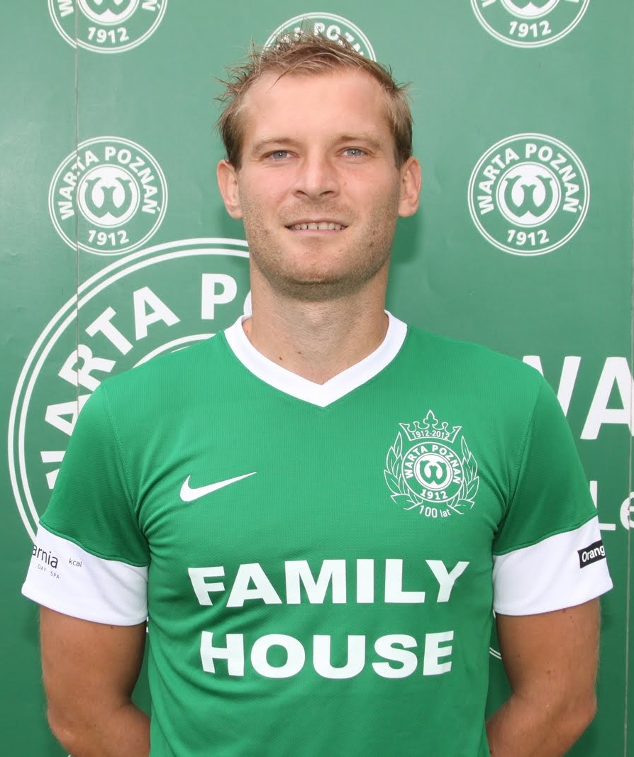 Karol Gregorek, jako piłkarz Warty Poznań w 2013 roku.